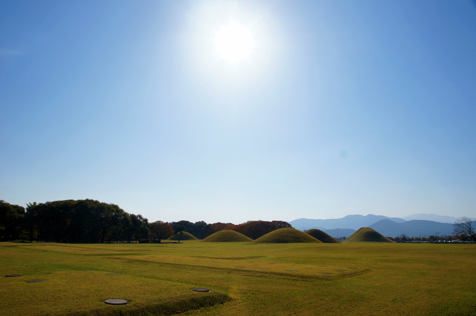 경주 오릉